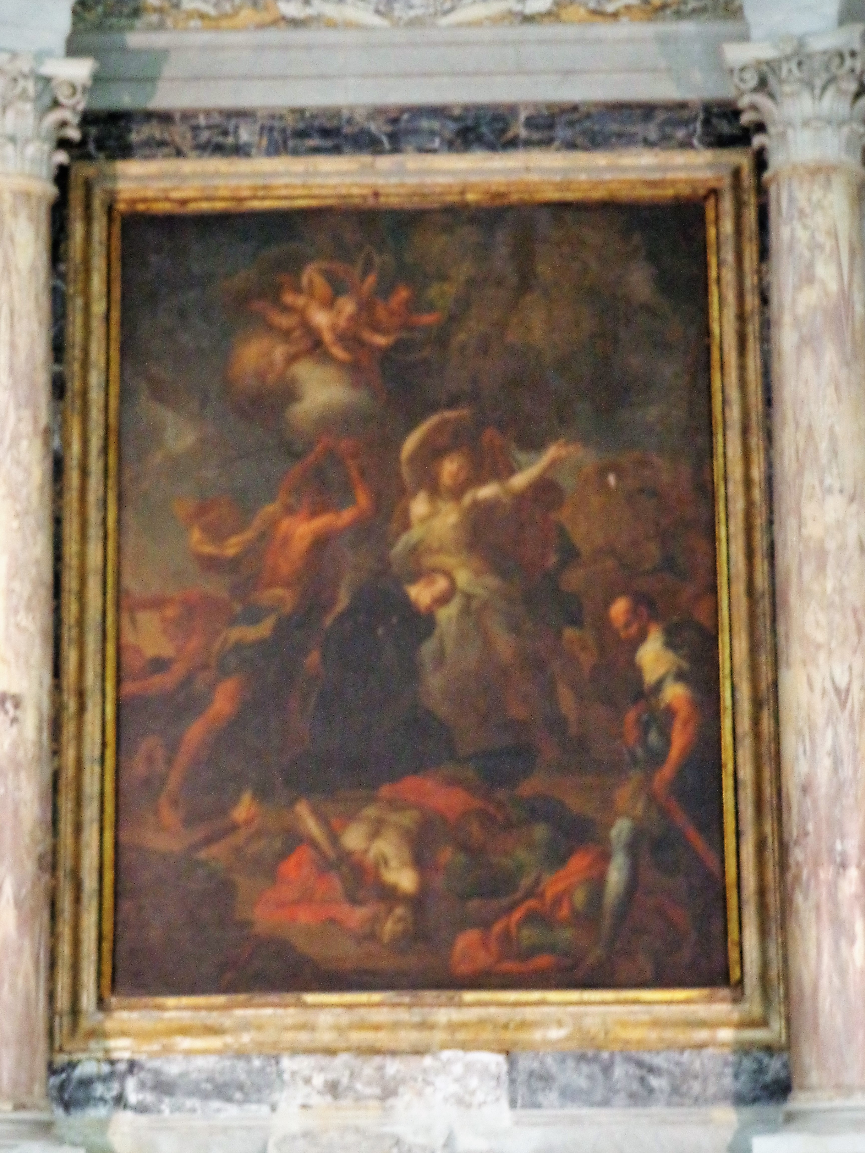 Martirio di San Placido e Santa Flavia, dipinto opera di Placido Campolo, Cappella di San Placido.